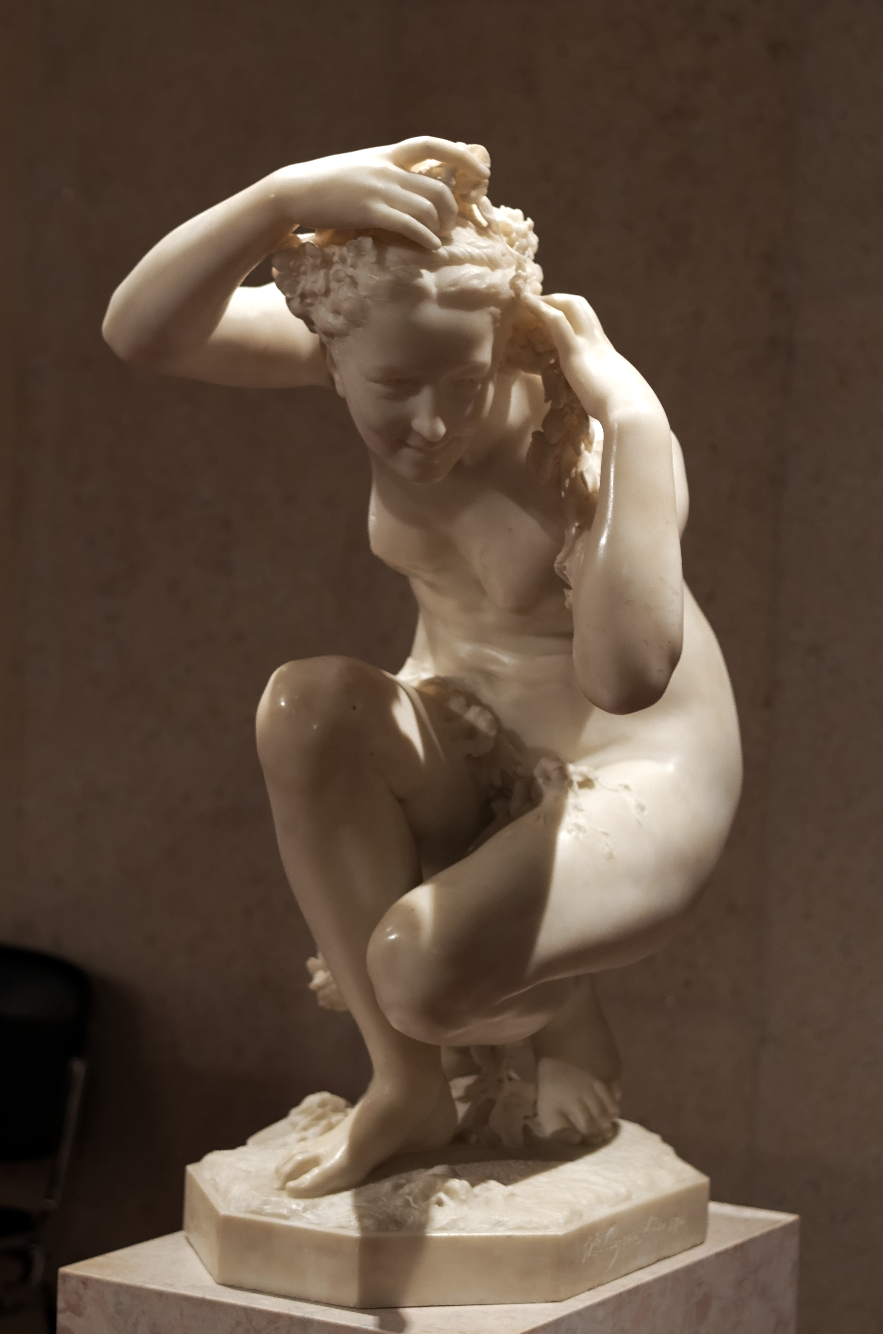 Flore. Marbre de Jean-Baptiste Carpeaux, Londres 1873. Exposé au musée Calouste Gulbenkian, Lisbonne. Inv 562